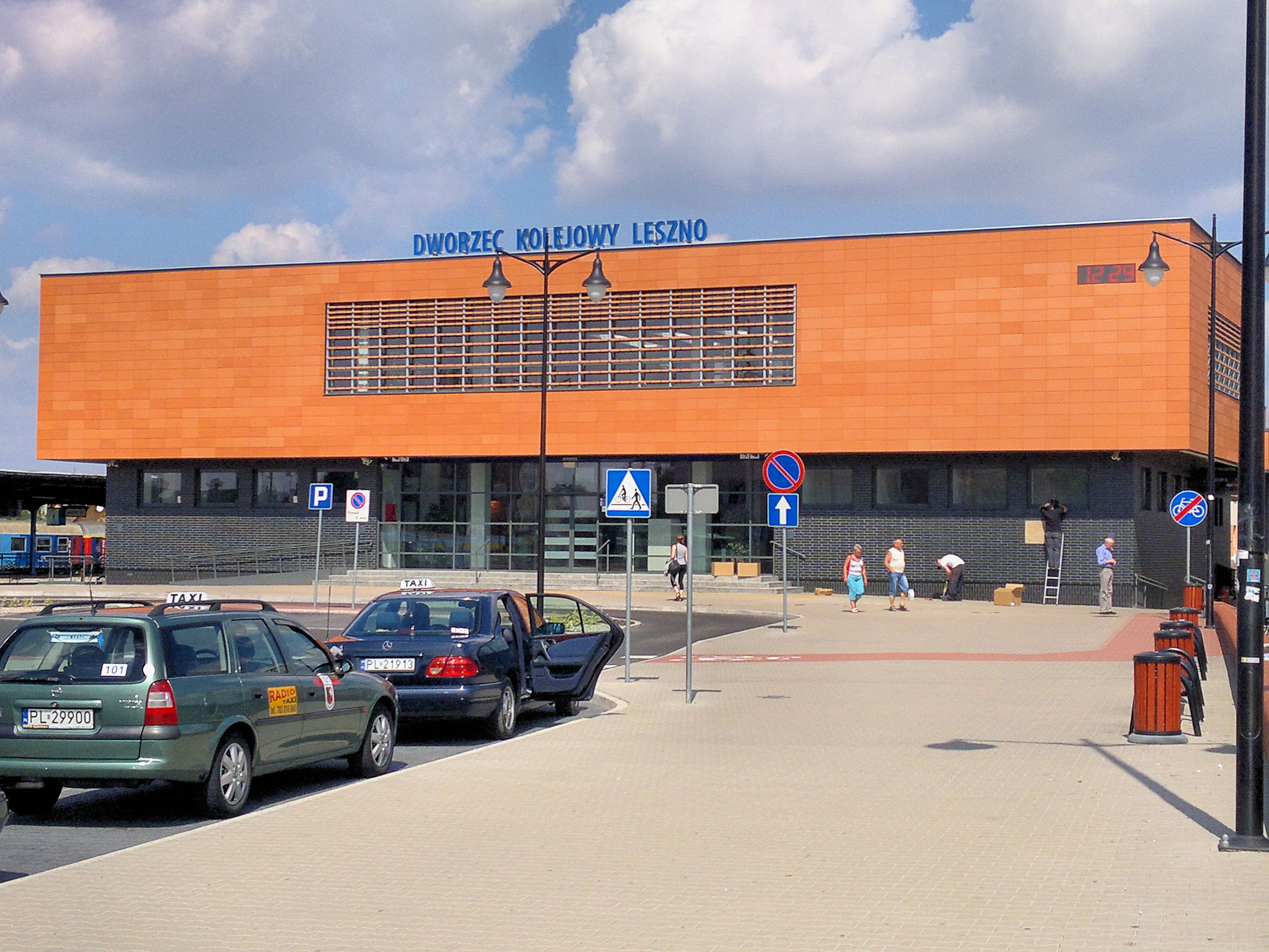 Budynek dworca PKP w Lesznie